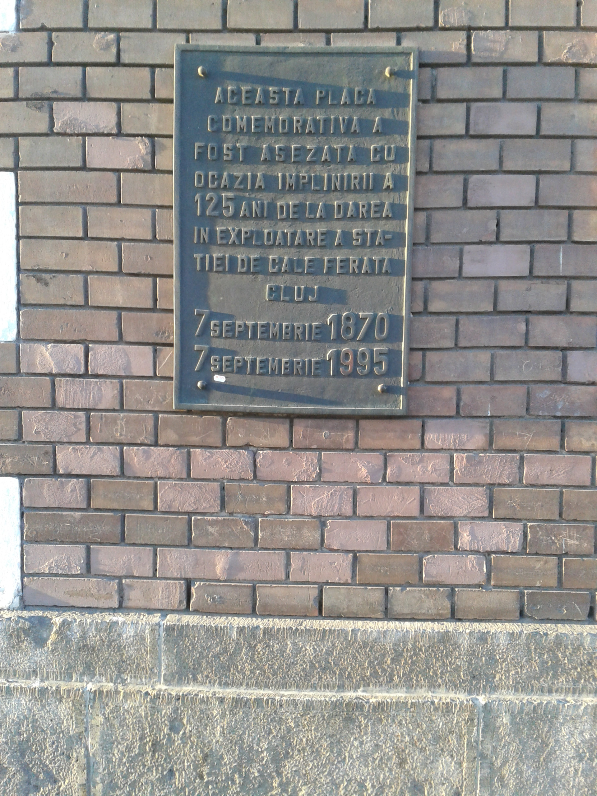 Placă comemorativă pe Gara din Cluj Napoca "Această placă comemorativă a fost aşezată cu ocazia împlinirii a 125 ani de la darea în exploatare a staţiei de cale ferată Cluj 7 septembrie 1870-7 septembrie 1995"